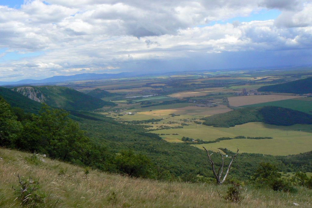 Východná čast Turnianskej kotliny. Vľavo planina Horný vrch, Zádielska tiesňava, Zádielska planina, Turniansky hradný vrch, vpravo štruktúrny tvrdoš Hradisko (výstup turnaika), vpravo hore východné ukončenie Dolného vrchu. V pozadí Košická rovina Košickej kotliny, pahorkatina Cserehát v Maďarsku, a úplne vzadu reťaz niekdajších suboceánskych stratovulkánov - Slanské vrchy/Zemplényi-hegység.